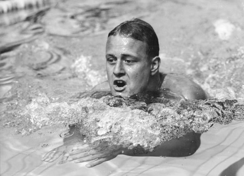 Frank Wiegand Zentralbild Kluge Sche 13.8.1968 Leipzig: DDR-Meisterschaften im Sportschwimmen eröffnet (13.8.) Zum dritten Mal steuert Frank Wiegand (ASK Vorwärts Rostock) die Teilnahme an Olympischen Spielen an. Auch für ihn bedeuten die Titelkämpfe eine entscheidende Station dazu. Für das 200 Meter Lagenschwimmen ist er einer der aussichtsreichen Bewerber um den Titel. Durch seinen Vorlaufsieg qualifizierte er sich für den Endlauf.